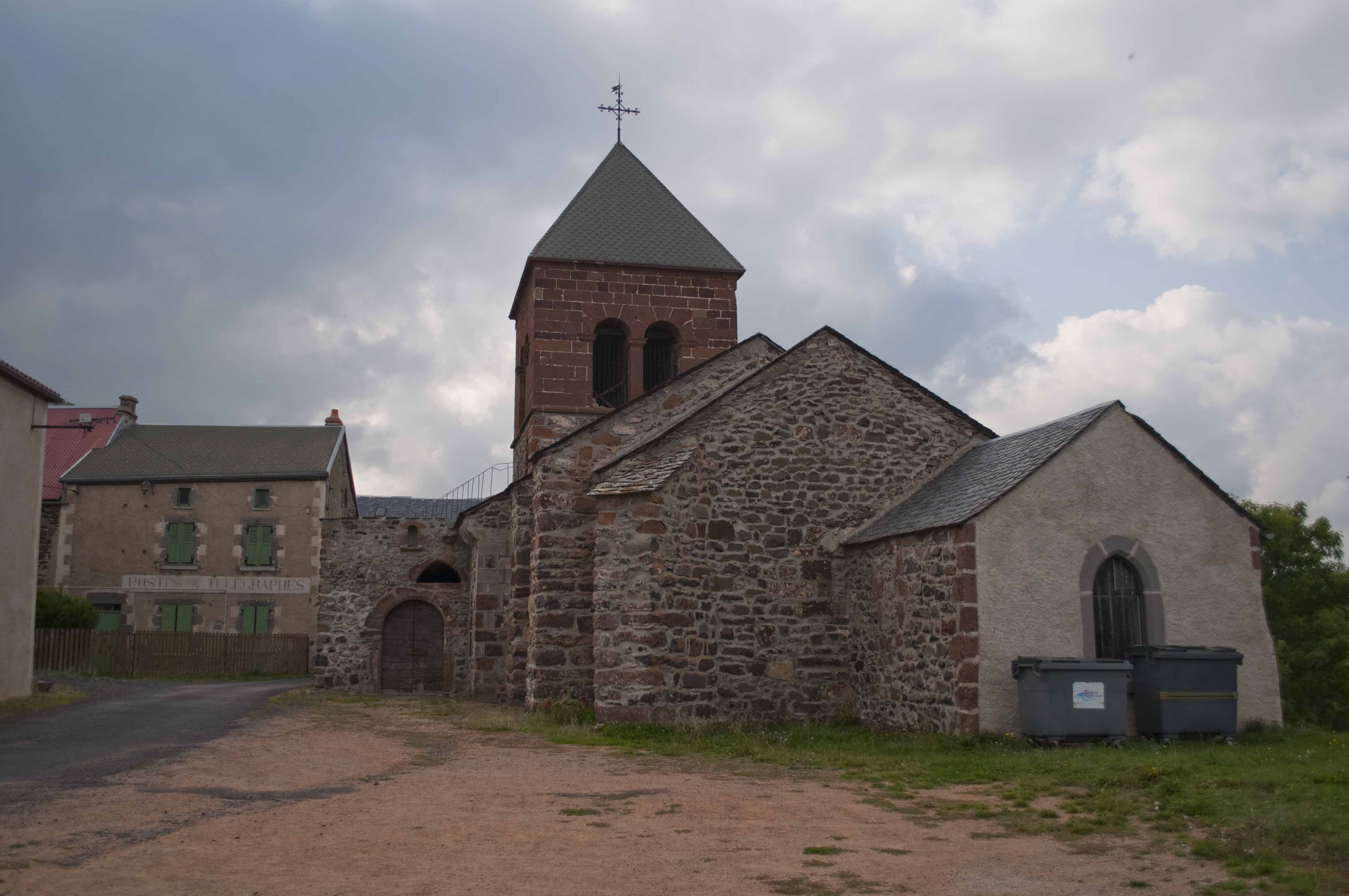 Eglise de la Chapelle Marcousse